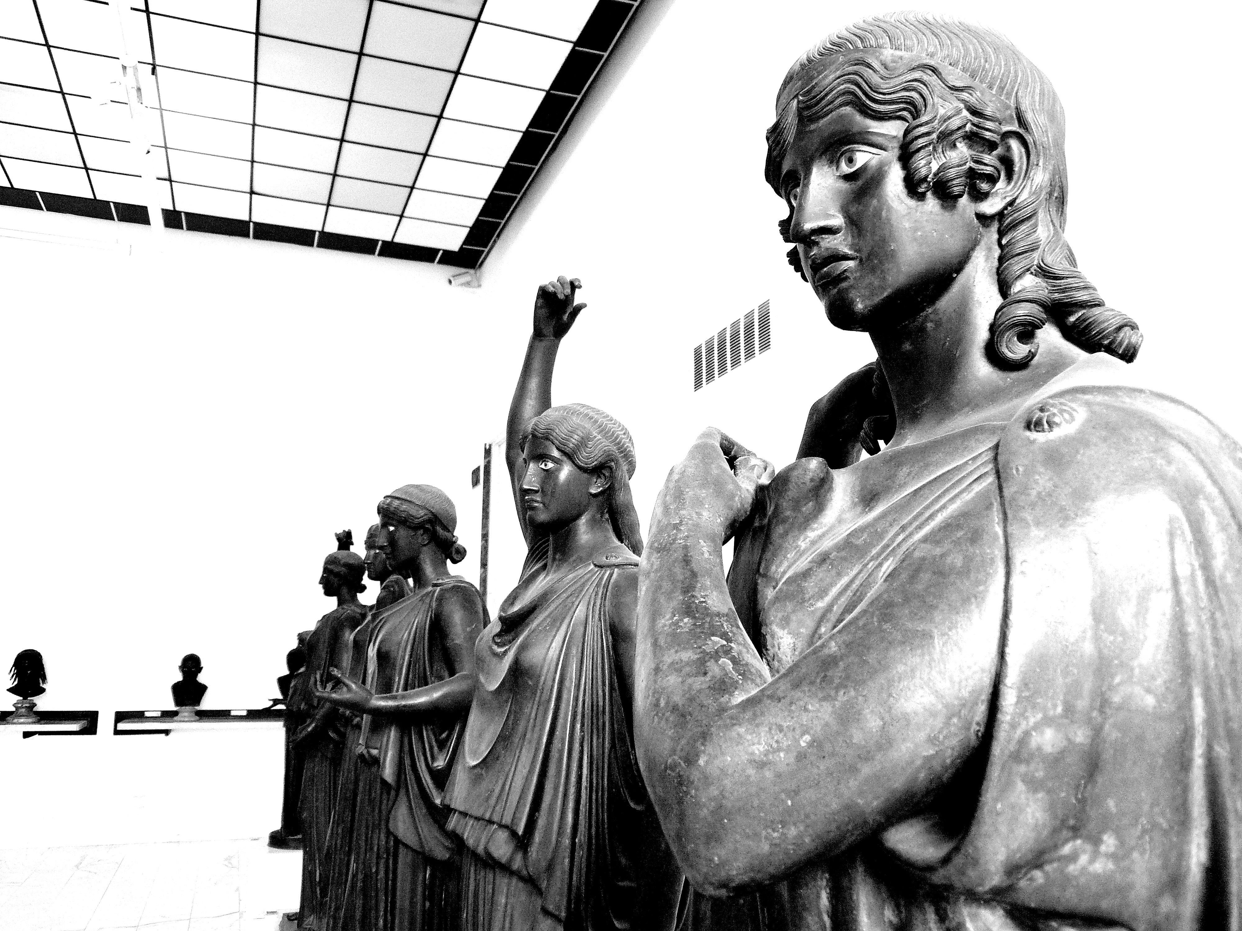 Museo Archeologico Nazionale di Napoli. Statue muliebri in bronzo di epoca romana rinvenute ad Ercolano nella Villa dei Papiri. Le cinque figure femminili (più una sesta di dimensioni minori e in atteggiamento da orante), benché trovate in punti diversi del giardino della villa, probabilmente decoravano in origine il peristilio minore, al centro del quale vi è una lunga piscina con sei nicchie al suo interno. Le figure femminili sono state variamente interpretate: dapprima come danzatrici, poi come portatrici di acqua, più recentemente come le Danaidi, le sciagurate figlie di Danao condannate per i loro misfatti ad attingere acqua in eterno. Oggi più correttamente si indicano semplicemente come peplophorai. Autore della foto: Roberto De Martino.